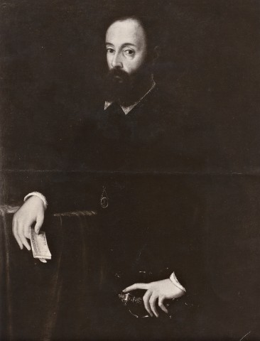 Galeotto II Pico della Mirandola